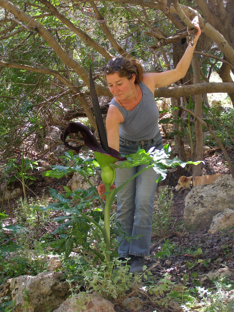 Dracunculus_vulgaris, ein sehr großes Exemplar bei Lissos / Kreta